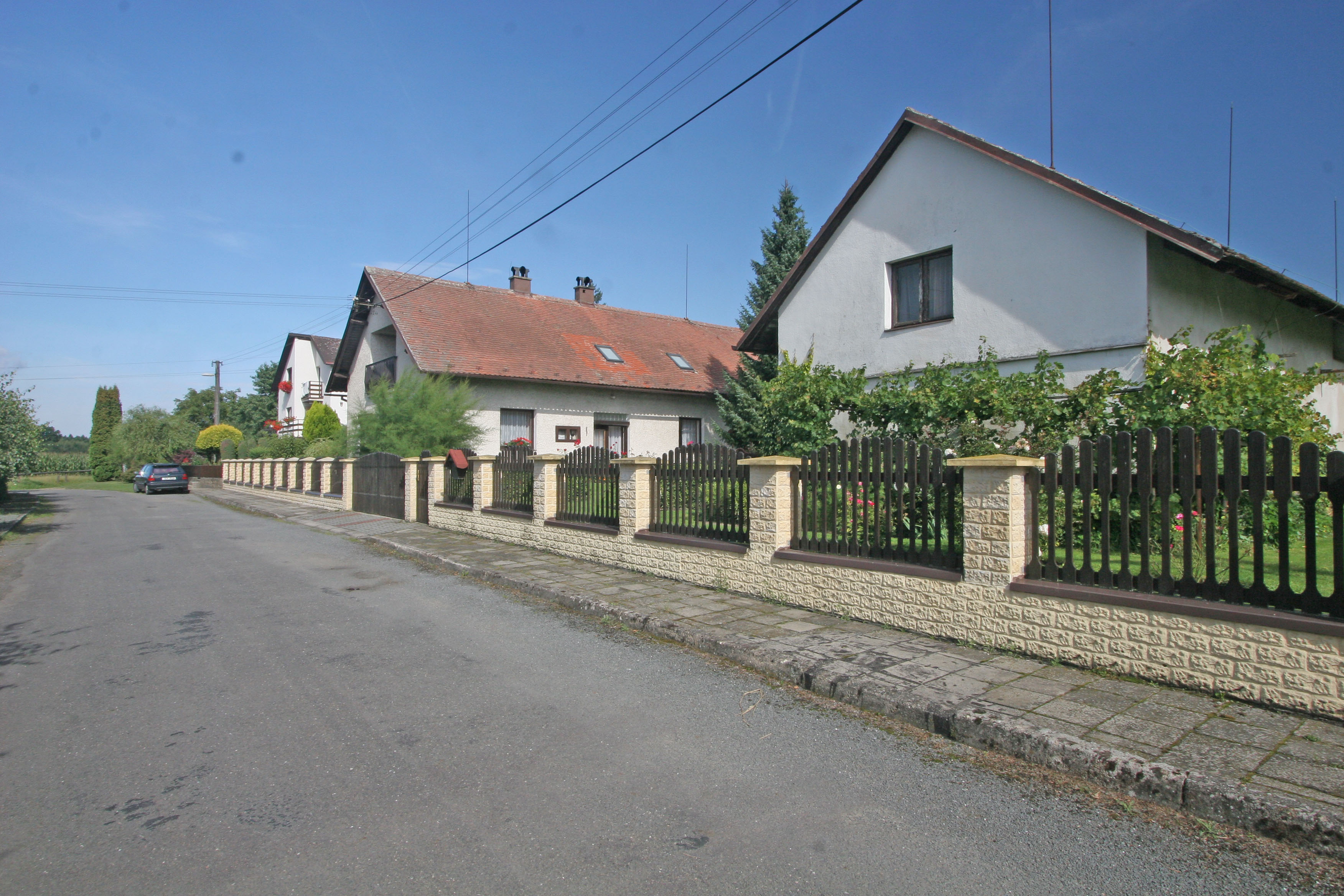 Rašovy čp. 24